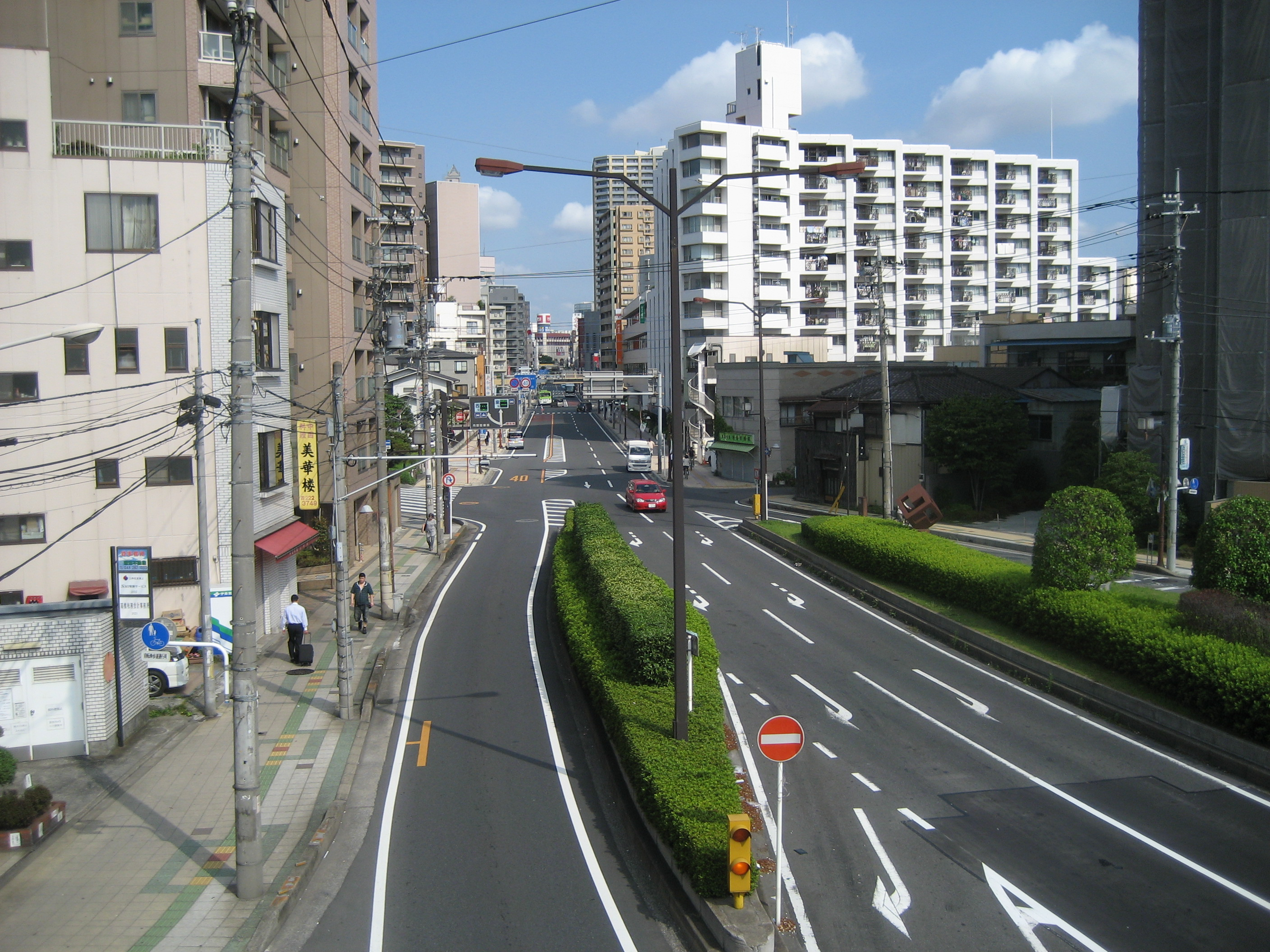 埼玉県道89号線川口市本町ロータリー交差点から川口駅方向を撮影